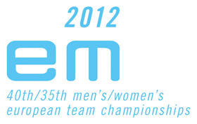 Logo der Mannschafts-EM der Herren und Fauen 2012